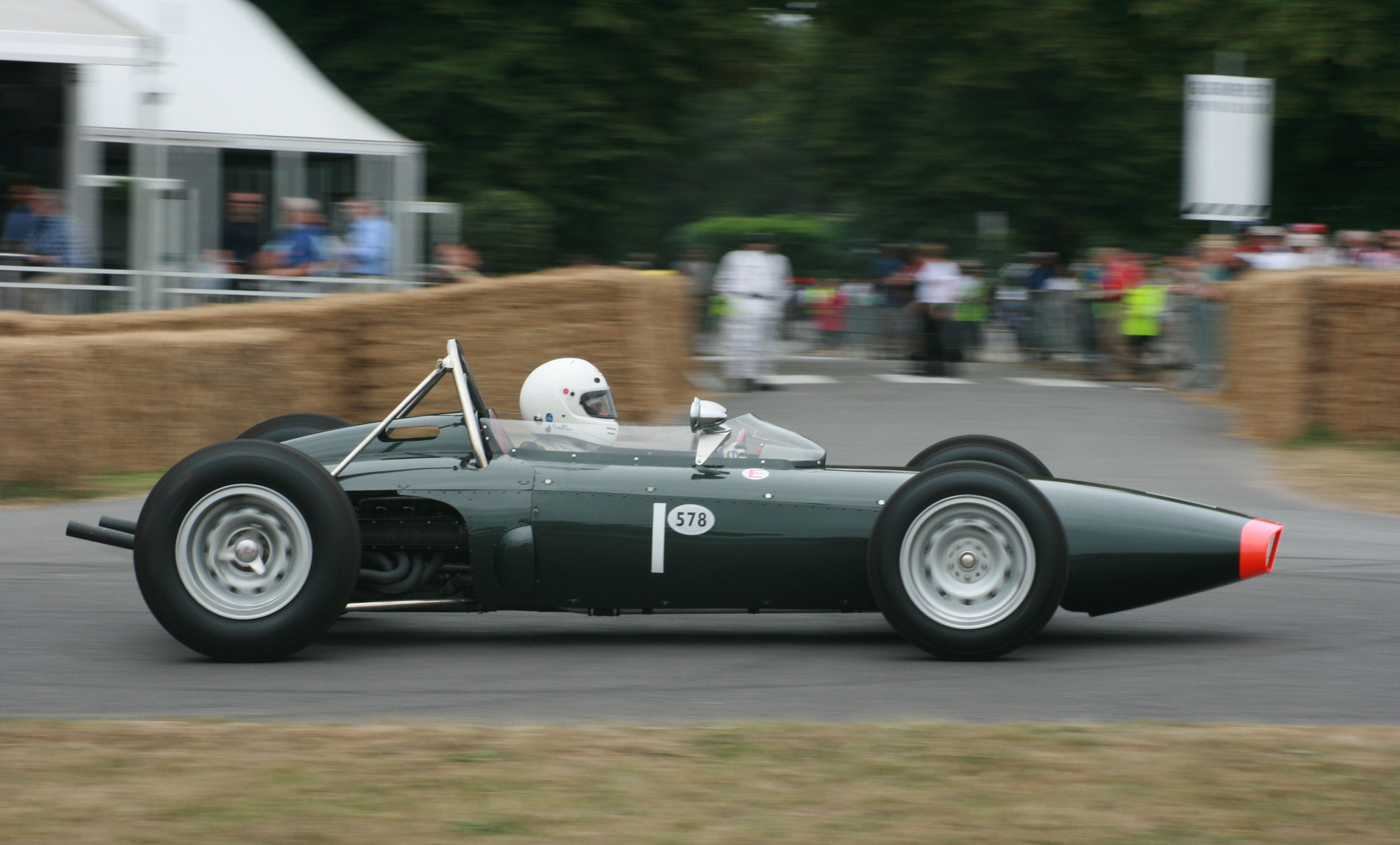 BRM P578